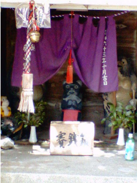 柴右衛門狸の祠 撮影者:Goki 撮影日:2004年8月3日 この画像はGFDLで利用できます。Goki 2004年8月12日 (木) 17:42 (UTC)